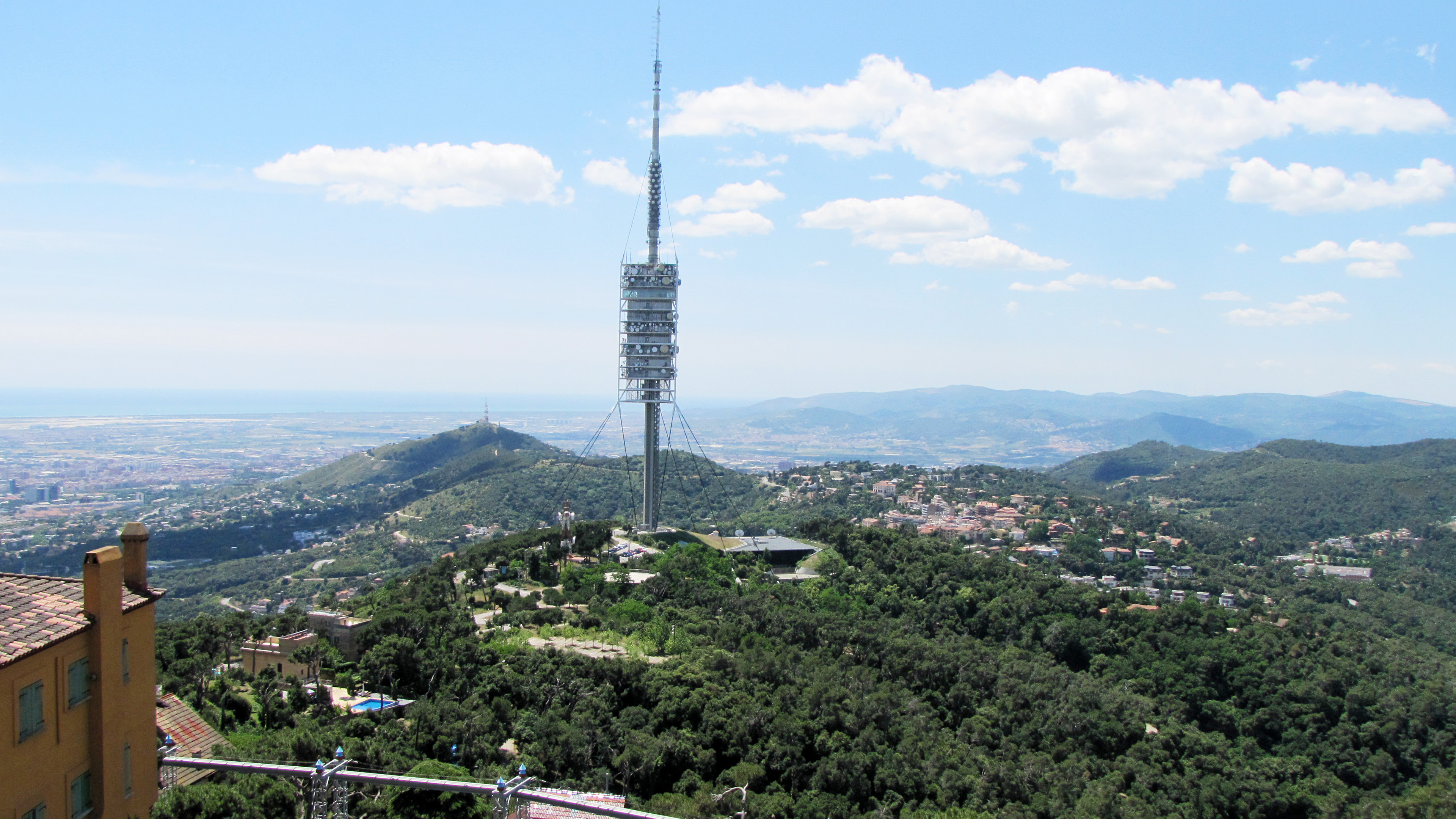 Тибидабо